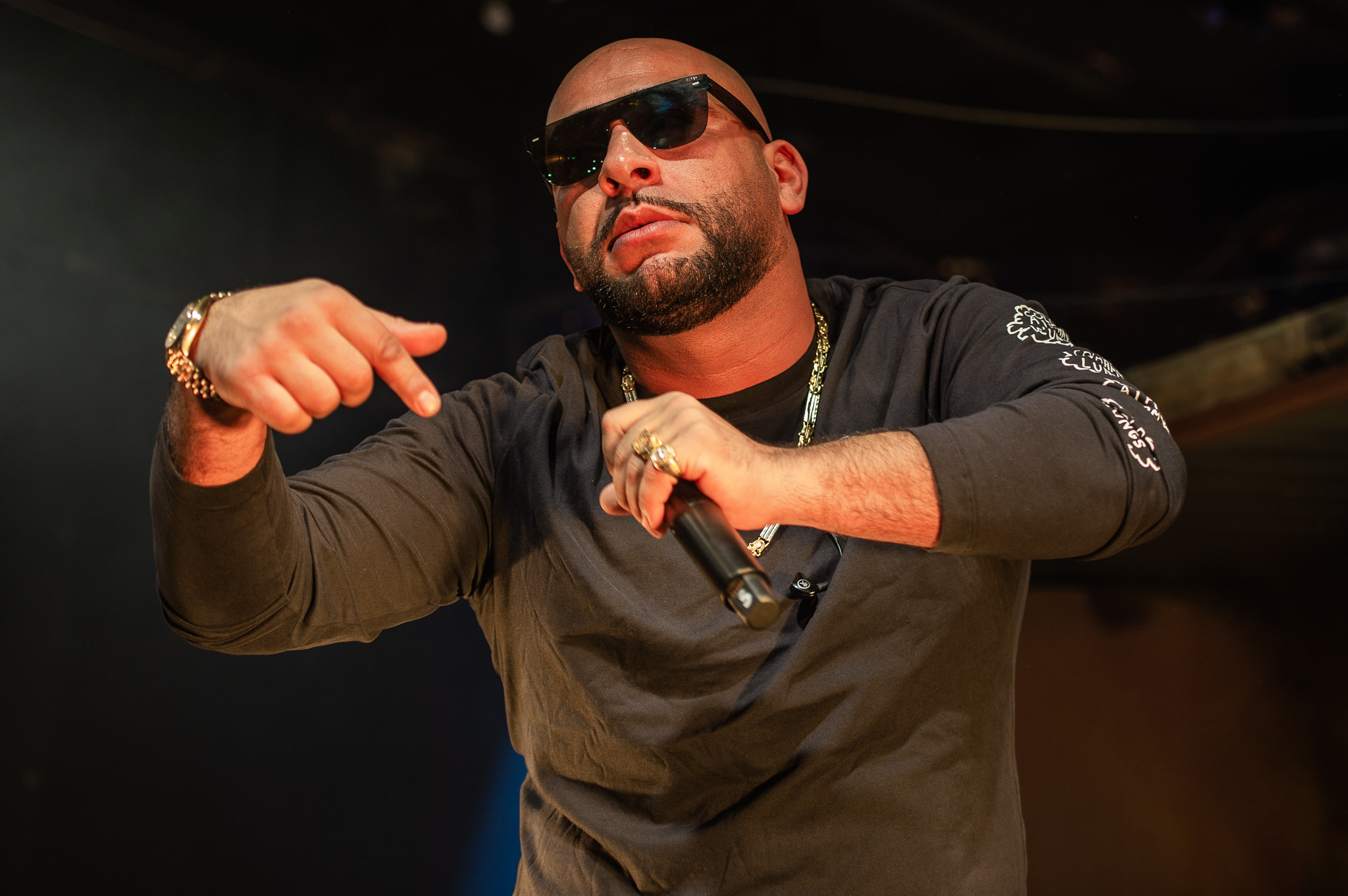 Concertbüro Franken,Der Hirsch,Konzert,Livekonzert,Livemusik,Musik,Veysel Gelin